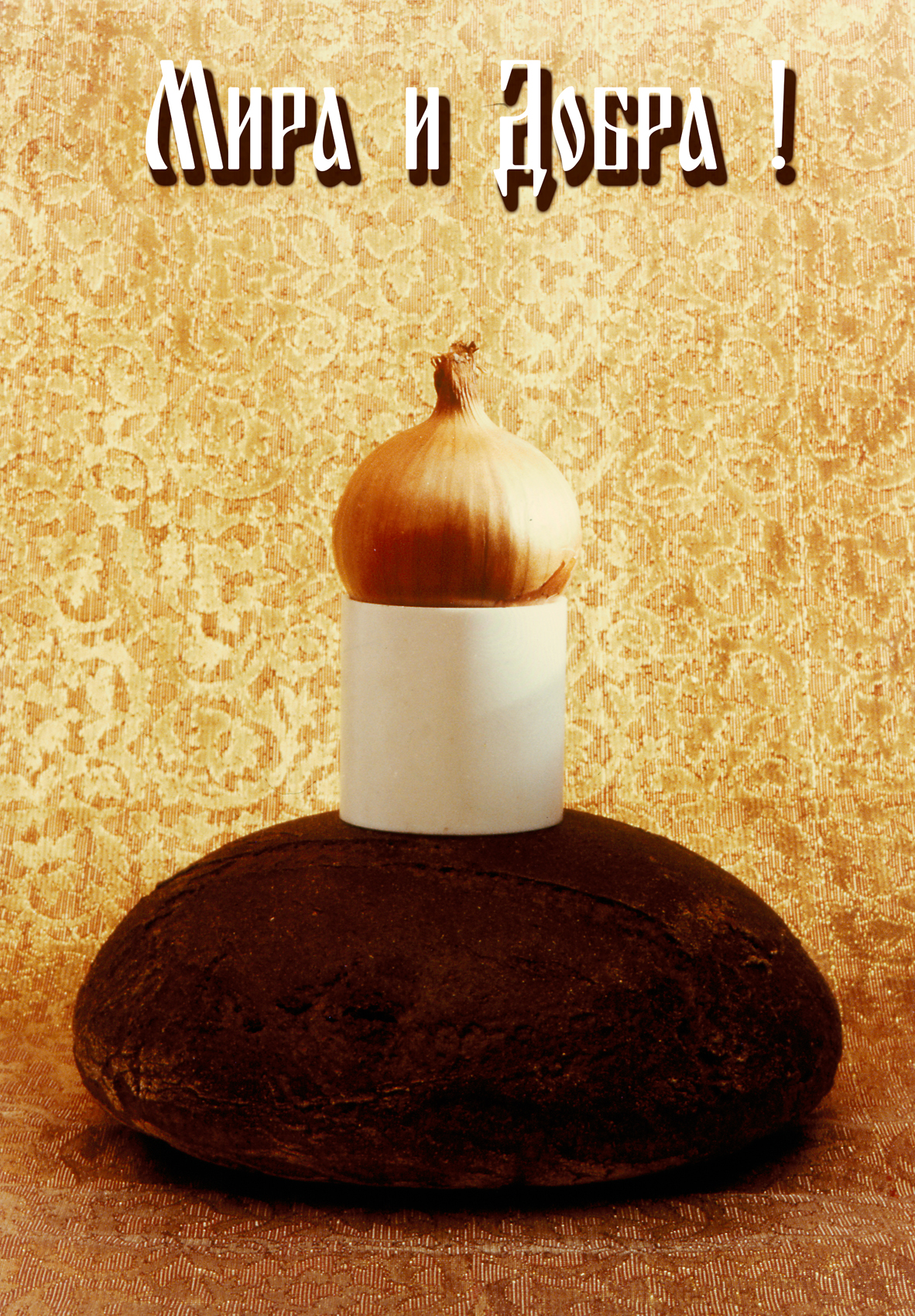 МИРА И ДОБРА! Постановочное фото, 100х150 см. 1992 г